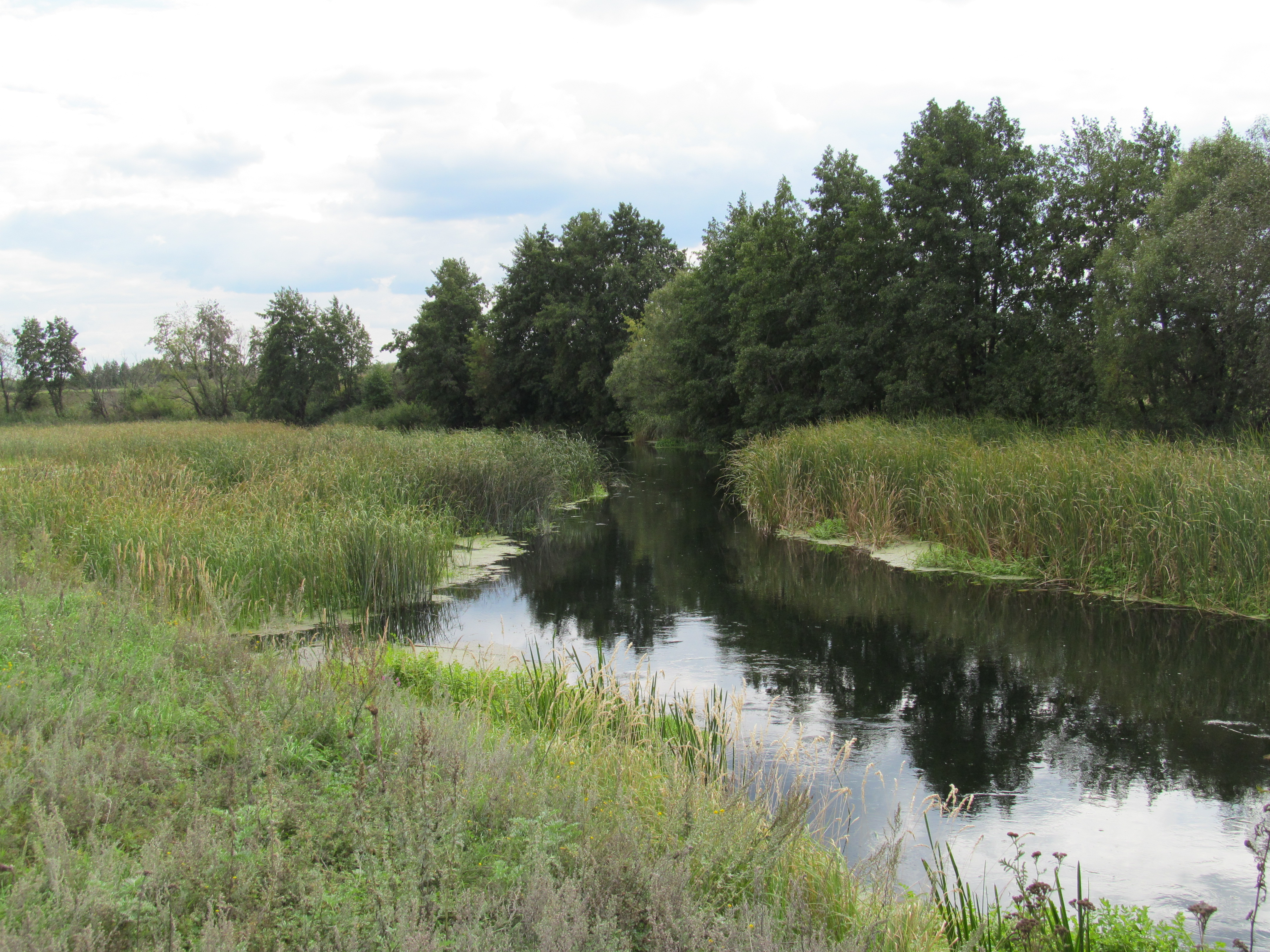 матыра БИз